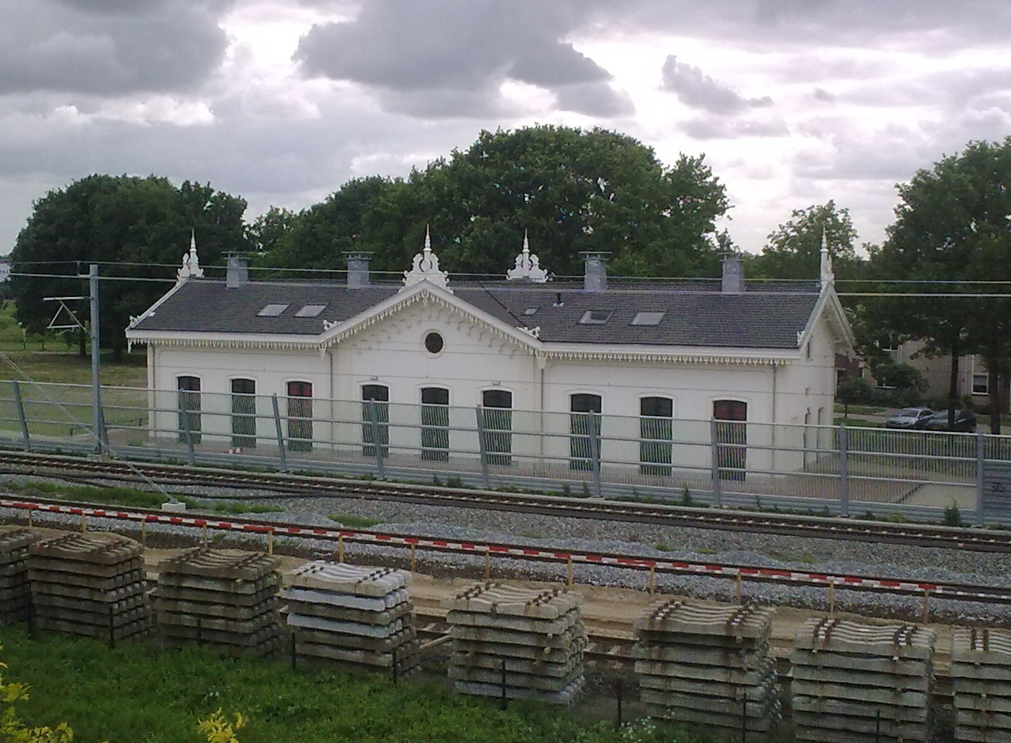 Het oude stationsgebouw Houten, op de nieuwe locatie en voorzien van decoratie op de dakpunten. Foto gemaakt vanuit de burelen van de redactie van de Winkler Prins.